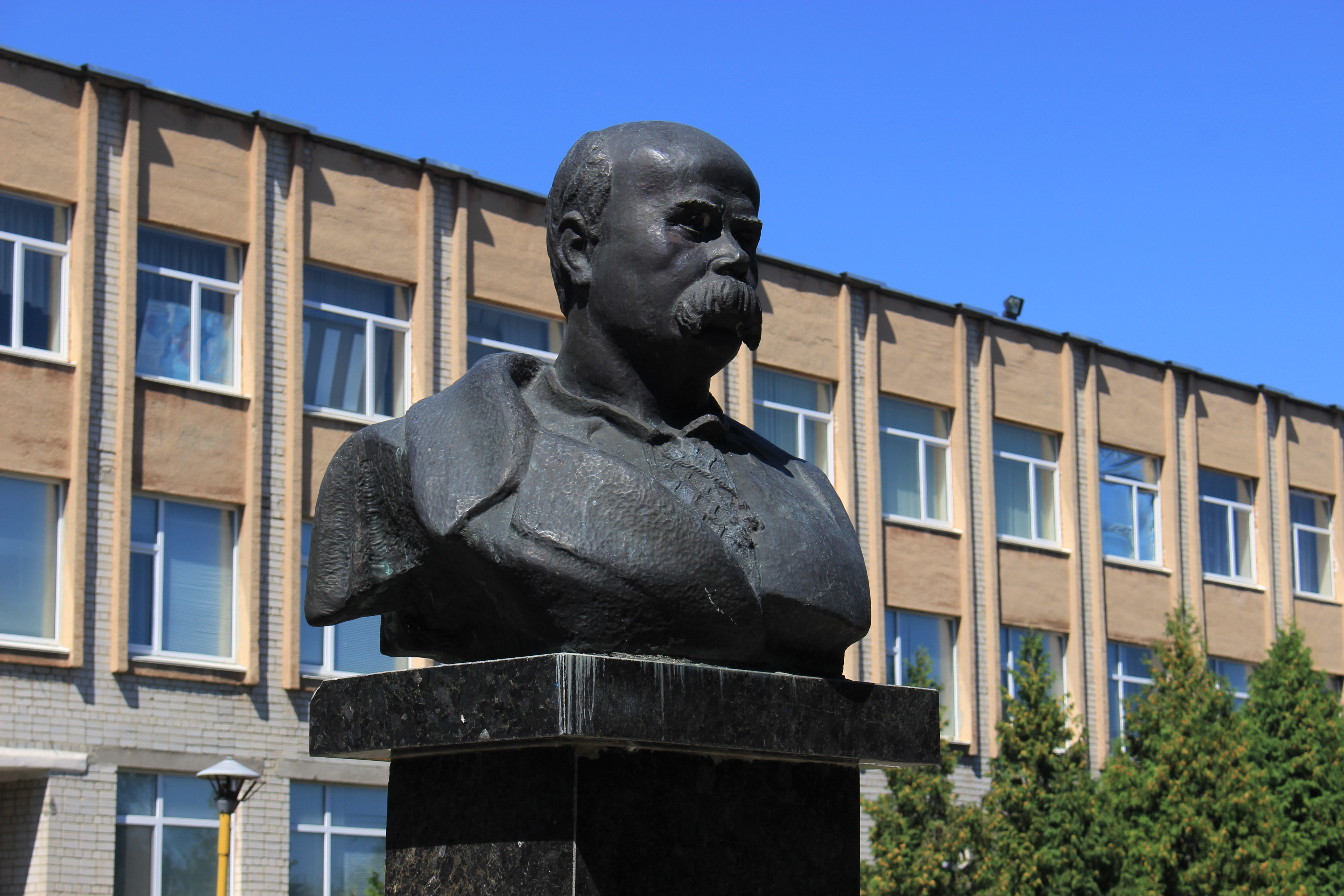 Пам'ятник Т.Г. Шевченку, Городище, вул. Шевченка